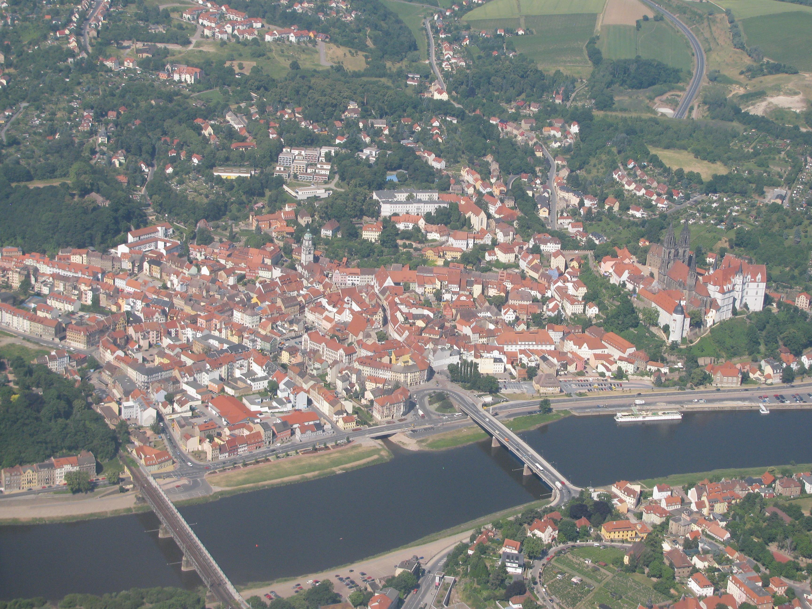 Meißen-Altstadt Luftbild